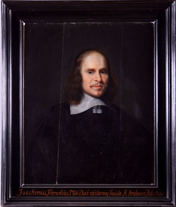 Portret in olieverf van Joachimus Frencelius, professor in de geneeskunde aan de Franeker universiteit van 1651 tot 1669. Frencelius staat afgebeeld in een toga over een donker kostuum met een platte vierkante kraag met akers. Hij draagt een kalot. Joachimus Frencelius (Camentz 1611 - Franeker na 1671) studeerde voornamelijk geneeskunde in Franeker en was tegelijk huisleraar van de zoontjes van Willem van Haren. Hij vergezelde deze jongens twee jaar naar Parijs, studeerde en promoveerde vervolgens in Padua en werd stadsdokter in Grave. In 1651 werd hij gevraagd hoogleraar geneeskunde in Franeker te worden in de plaats van Johannes Antonides van der Linden. (tekst: Museum Materna, Franeker)